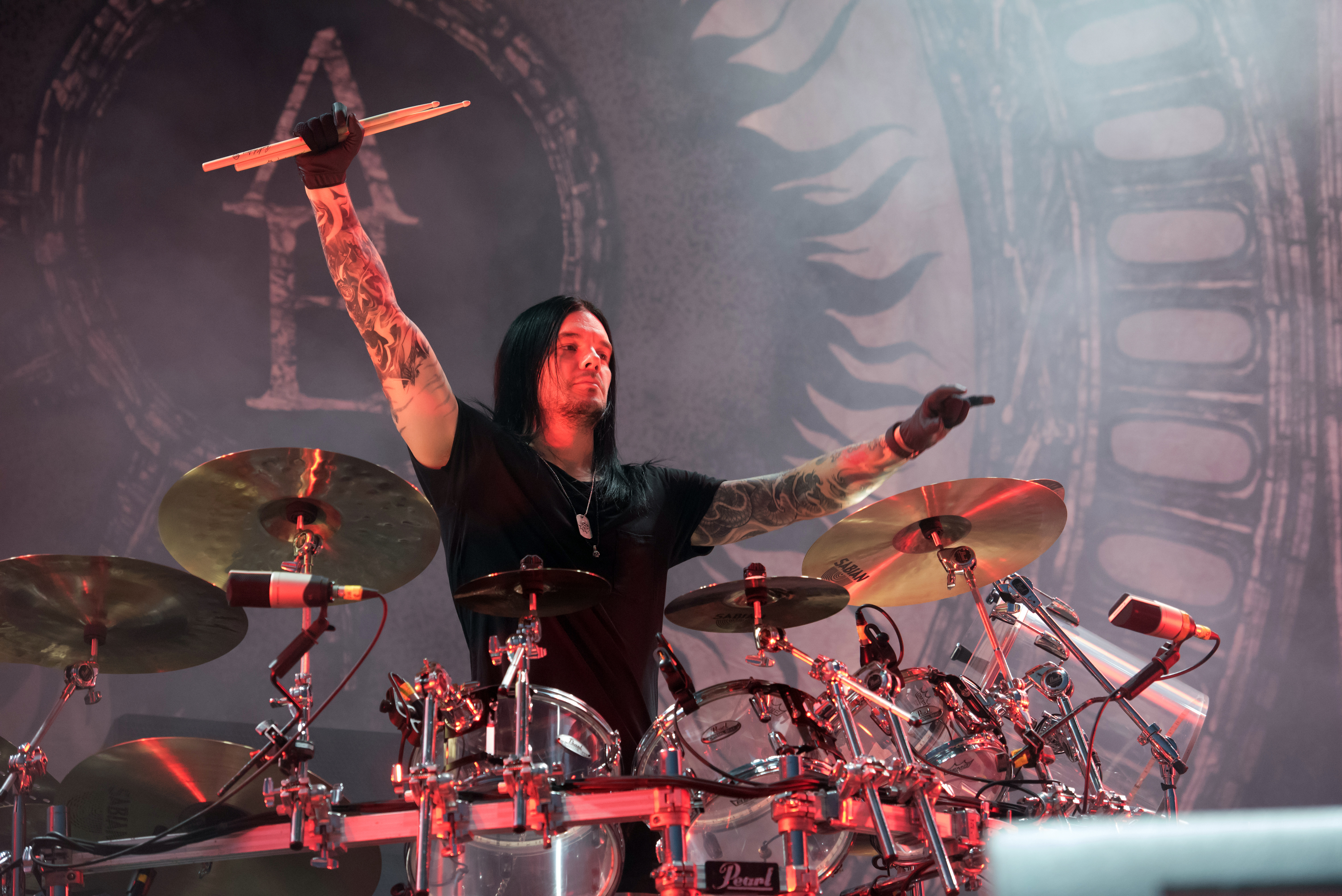 Arch Enemy beim Reload Festival 2016 in Sulingen